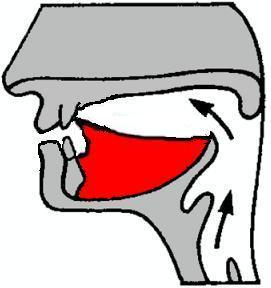 Dentaal fonetiek